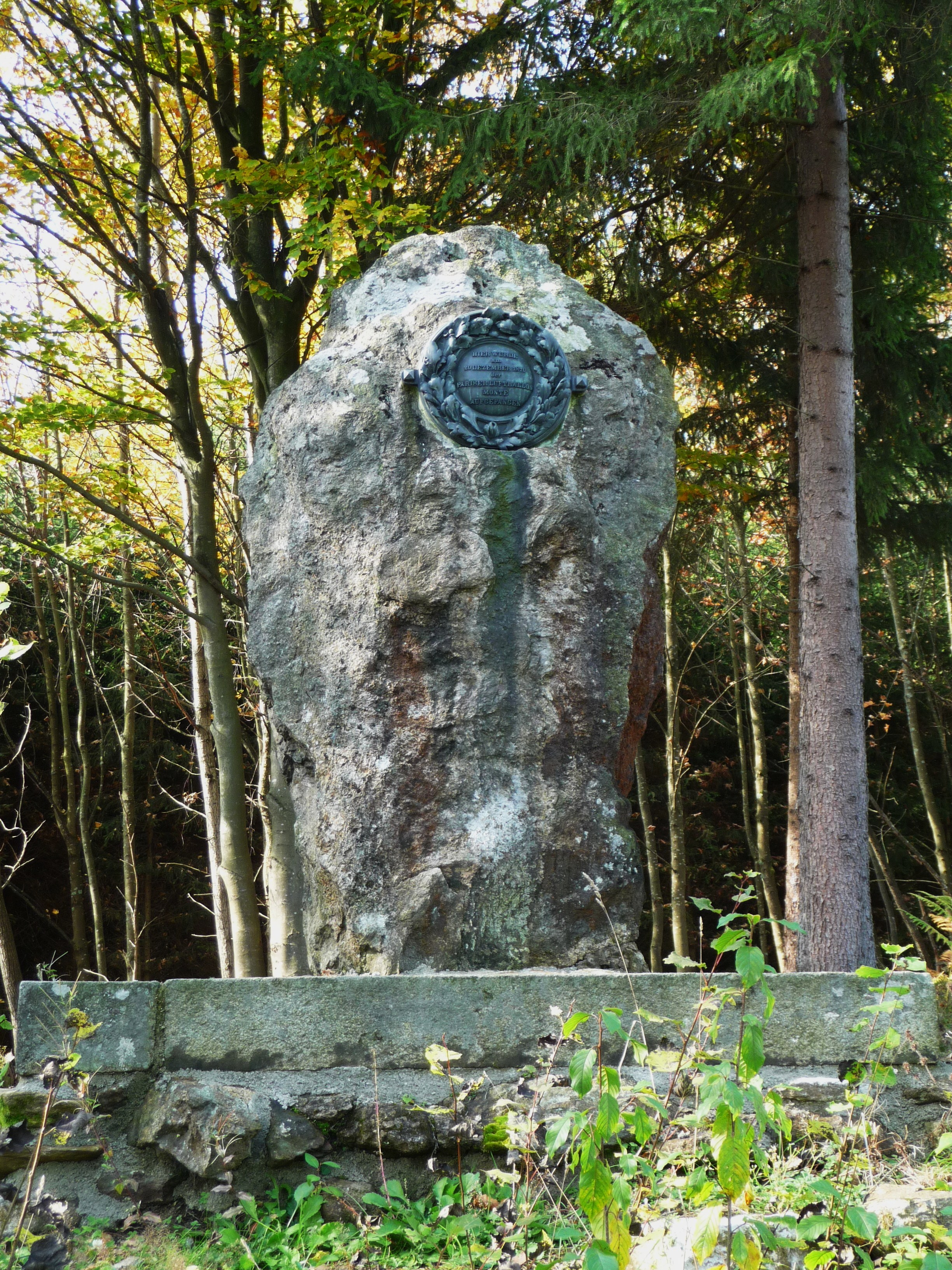 Das Monte-Denkmal in Reisachmühle bei Zwiesel, Gemeinde Langdorf